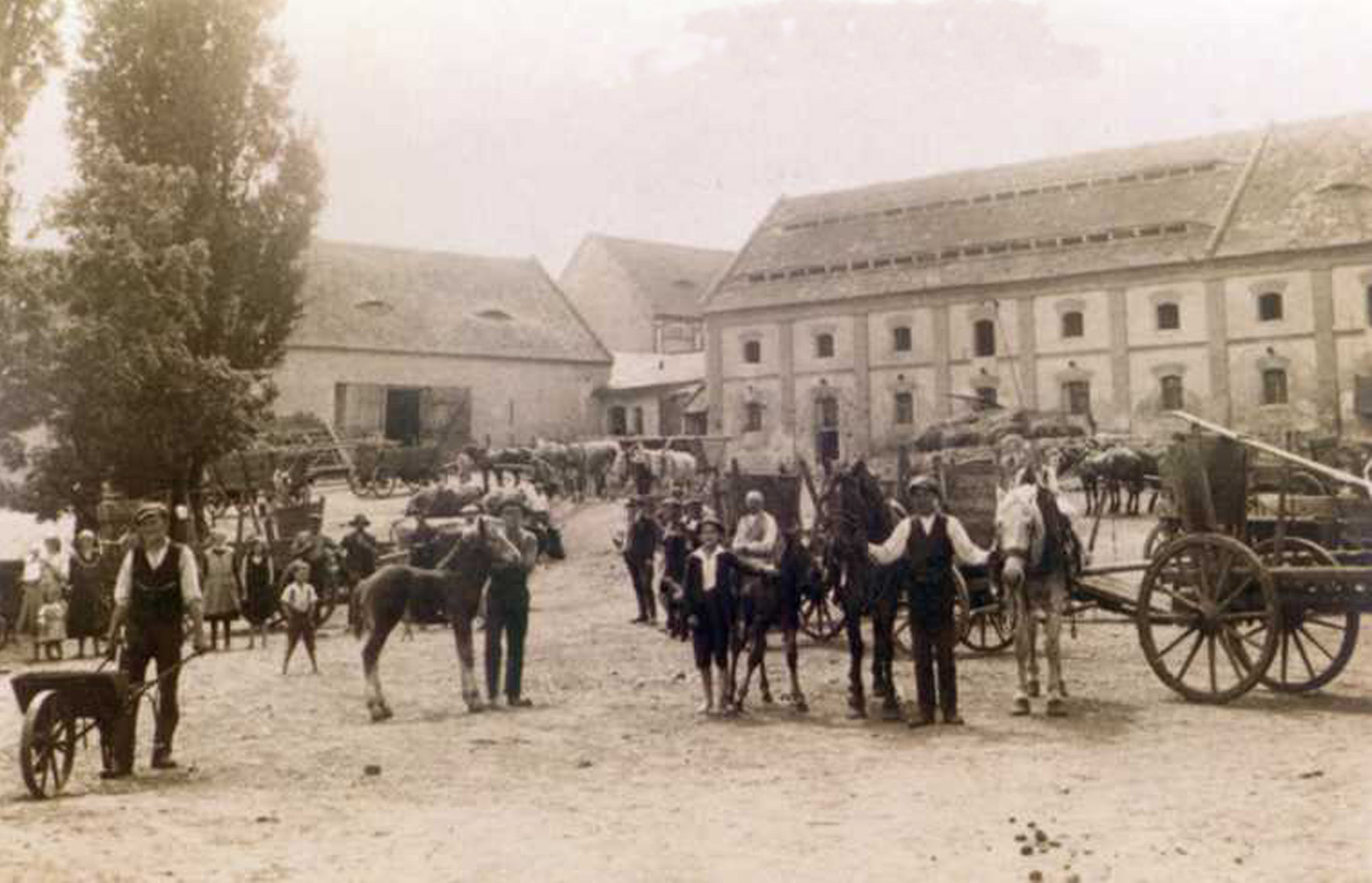 Ehemaliges Dorf Kamenná Voda (Steinwasser) bei Most (Brüx) in Tschechien.